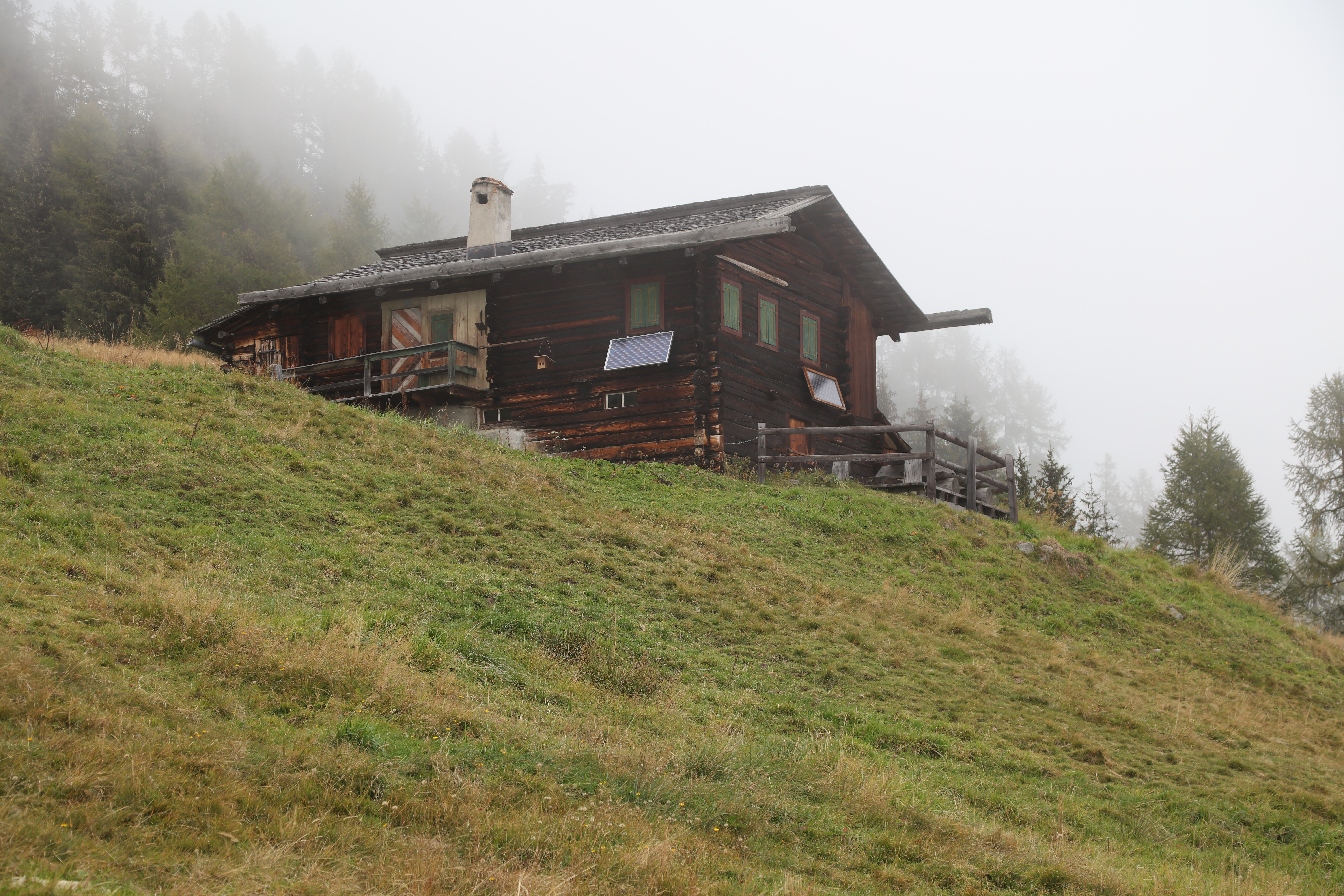 Die Stafelalp oberhalb Davos Frauenkirch. Das Haus in das Ernst Ludwig Kirchner im Jahr 1917 einzog.